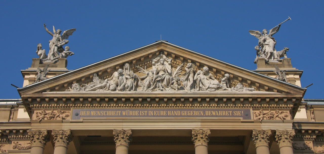 Tympanon des Hessischen Staatstheaters Wiesbaden